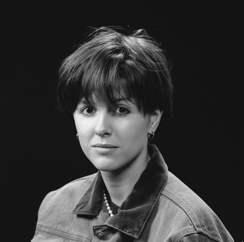 Chazia Mourali.